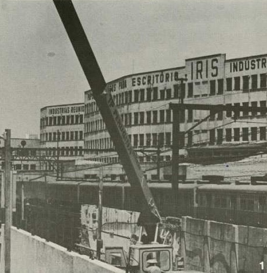 Vista da Indústria IRIS em meados de 1978, localizada ao lado da futura estação Bresser da Linha Leste-Oeste do Metrô. A planta industrial foi demolida na década de 2000 e sua área atualmente sedia um condomínio residencial.